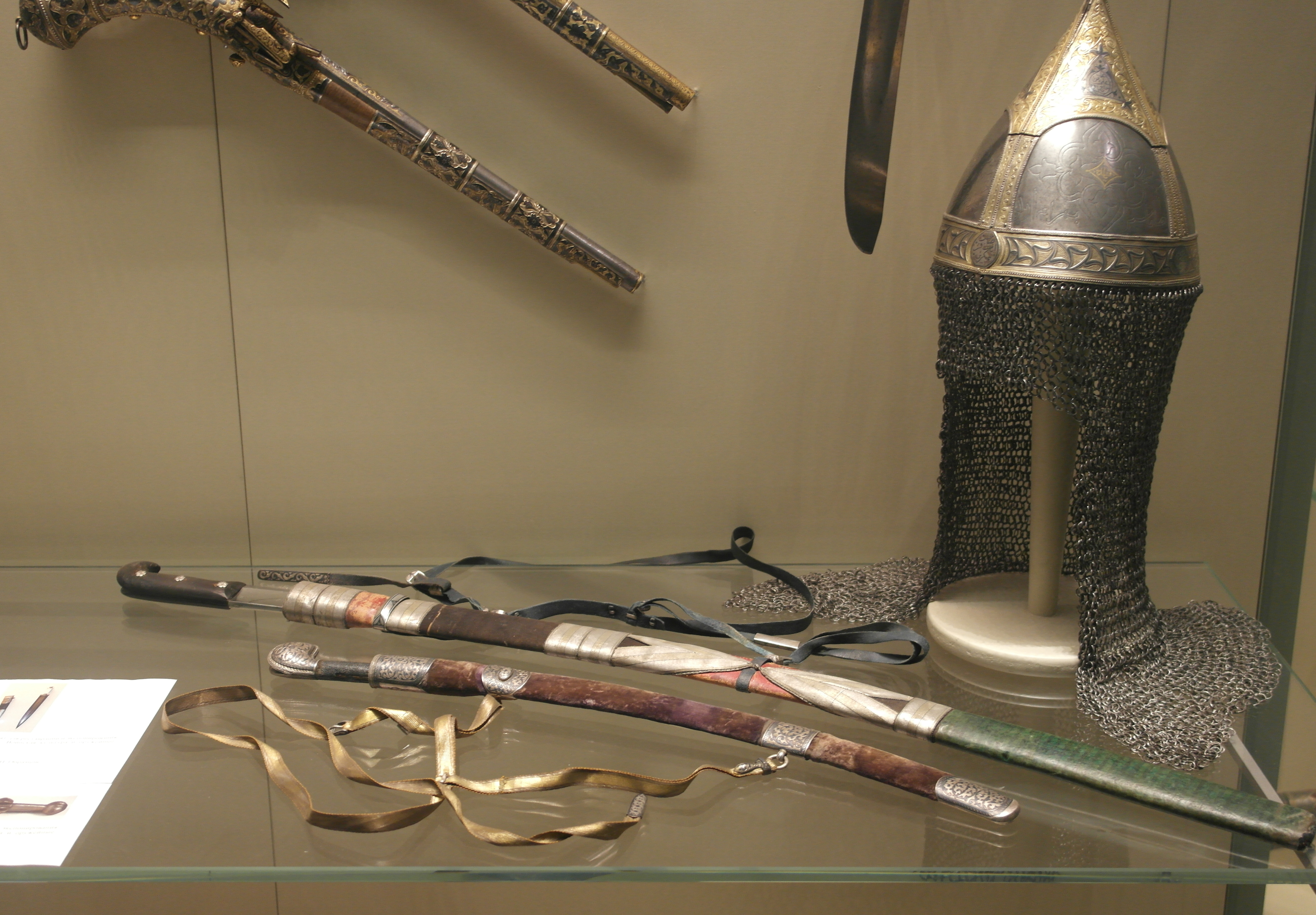 Эрмитаж - Зимний дворец - 1-й этаж - зал 65 - Восточное оружие